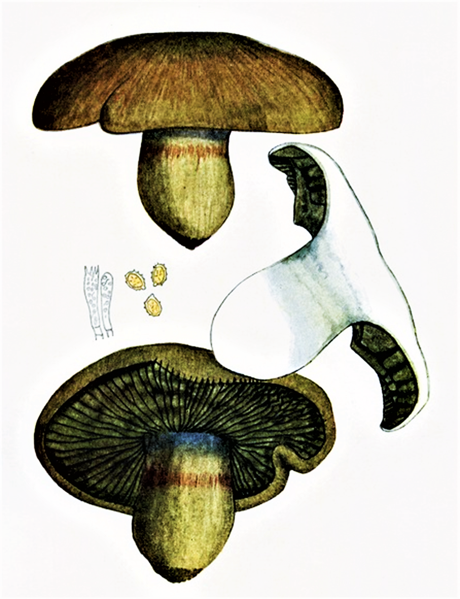 Giacomo Bresadola: Cortinarius infractus (Pers., 1799) Fr. (1838)